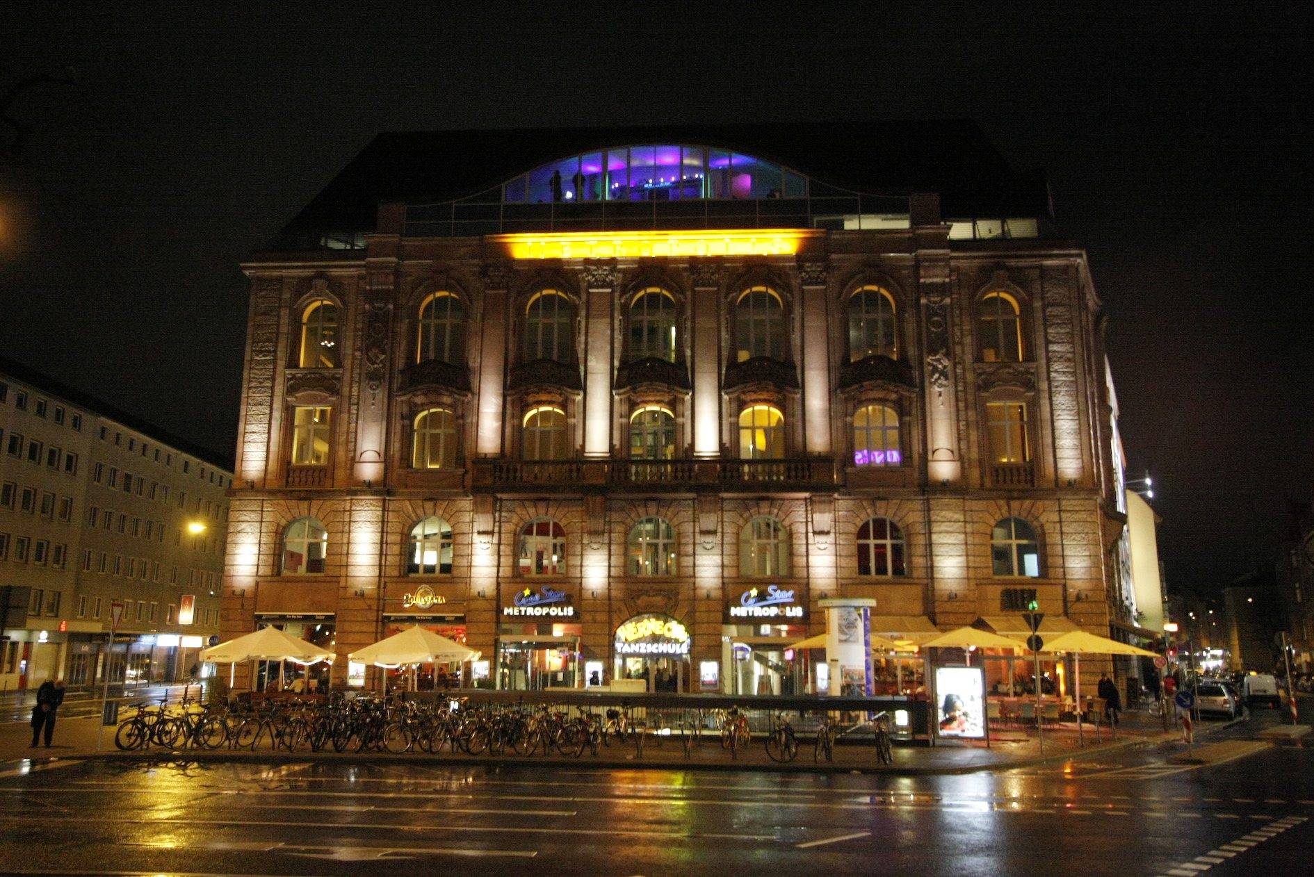 Cinestar Metropolis in Frankfurt/Eschenheimer Turm